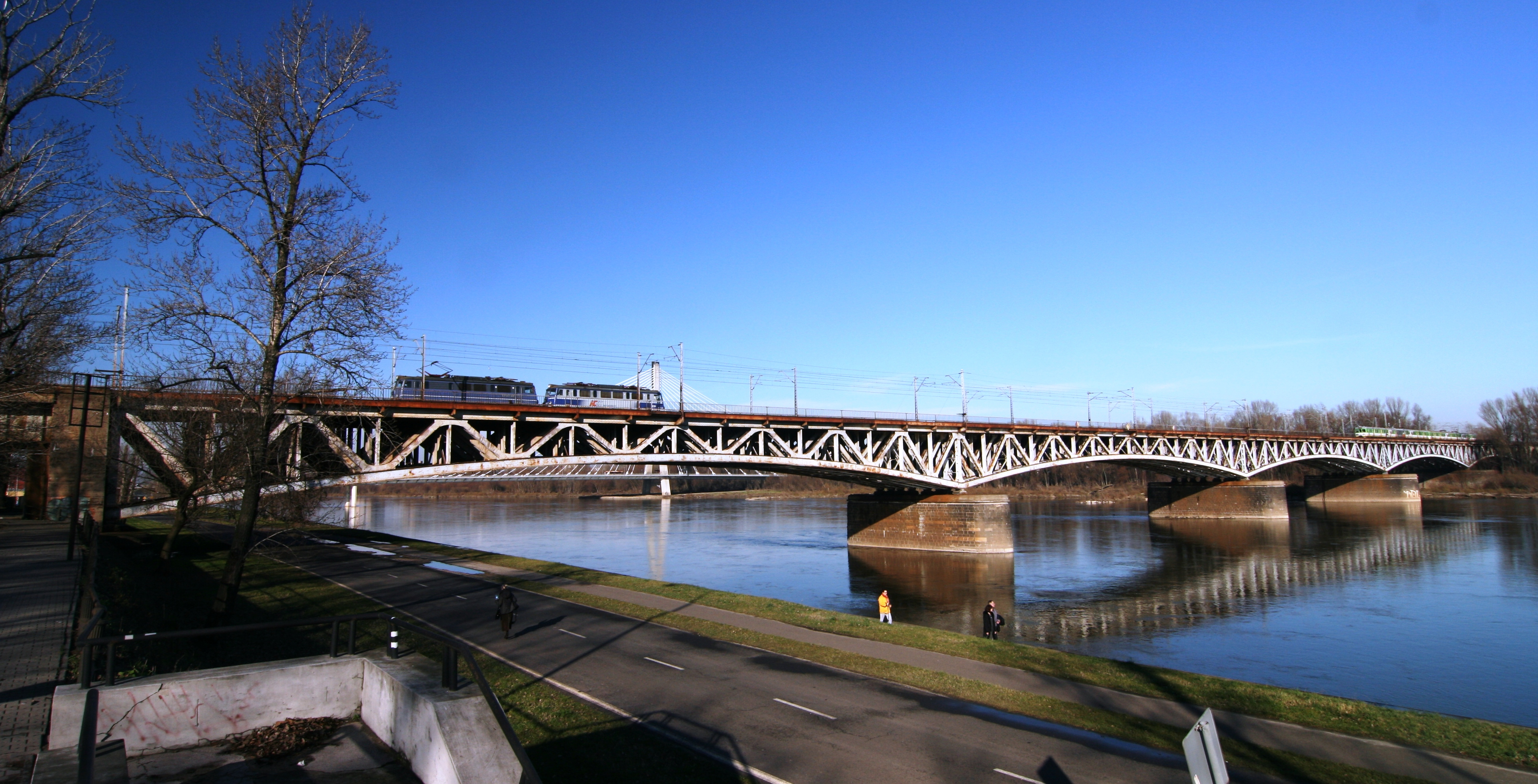 Most średnicowy w Warszawie